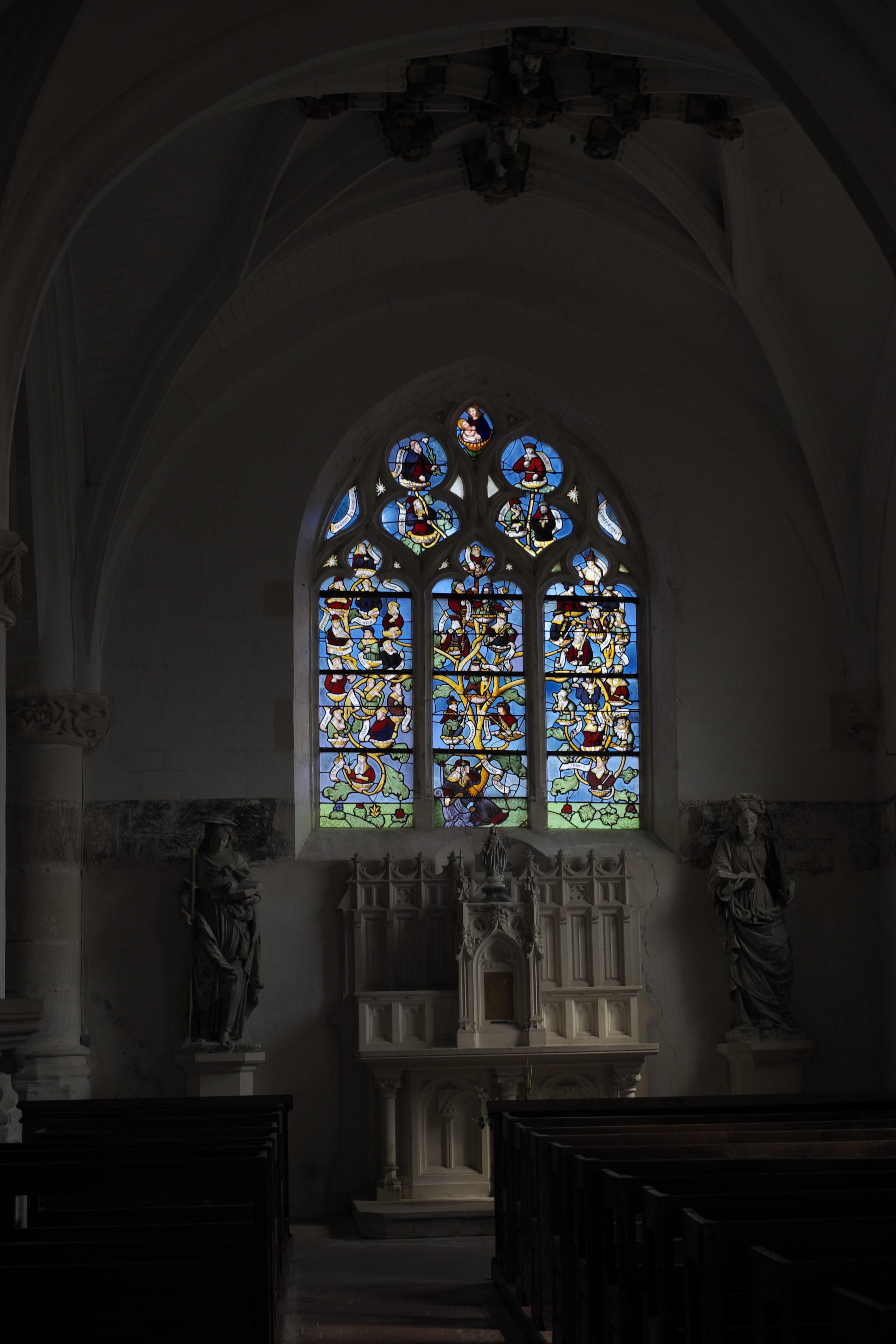 Katholische Kirche Notre-Dame-en-sa-Nativité in Puellemontier im Département Haute-Marne (Champagne-Ardenne/Frankreich), Bleiglasfenster von 1531; Darstellung: Wurzel Jesse .